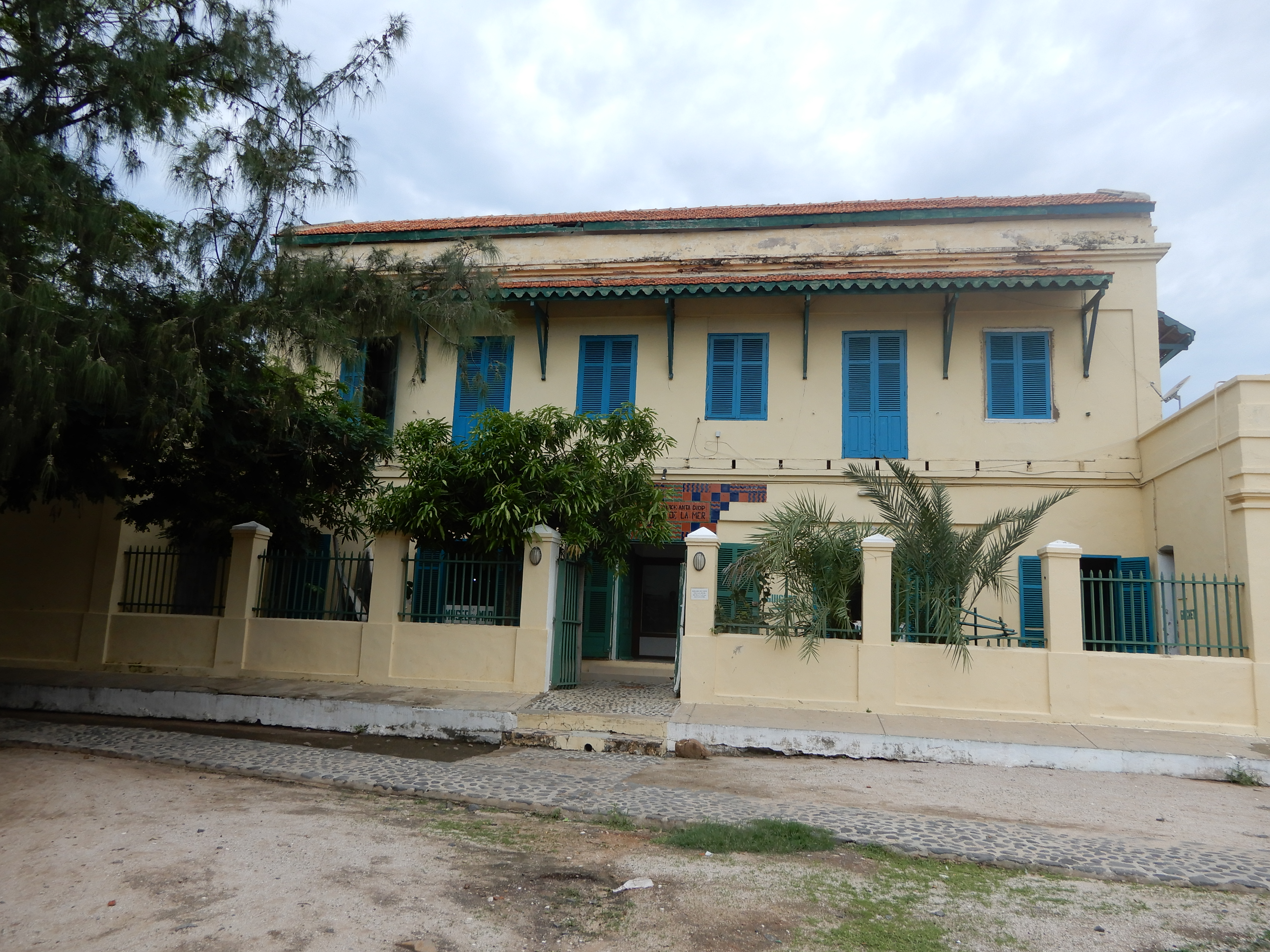 Musée de la mer de l'île de Gorée, au Sénégal dans une ancienne maison de la Compagnie des Indes.